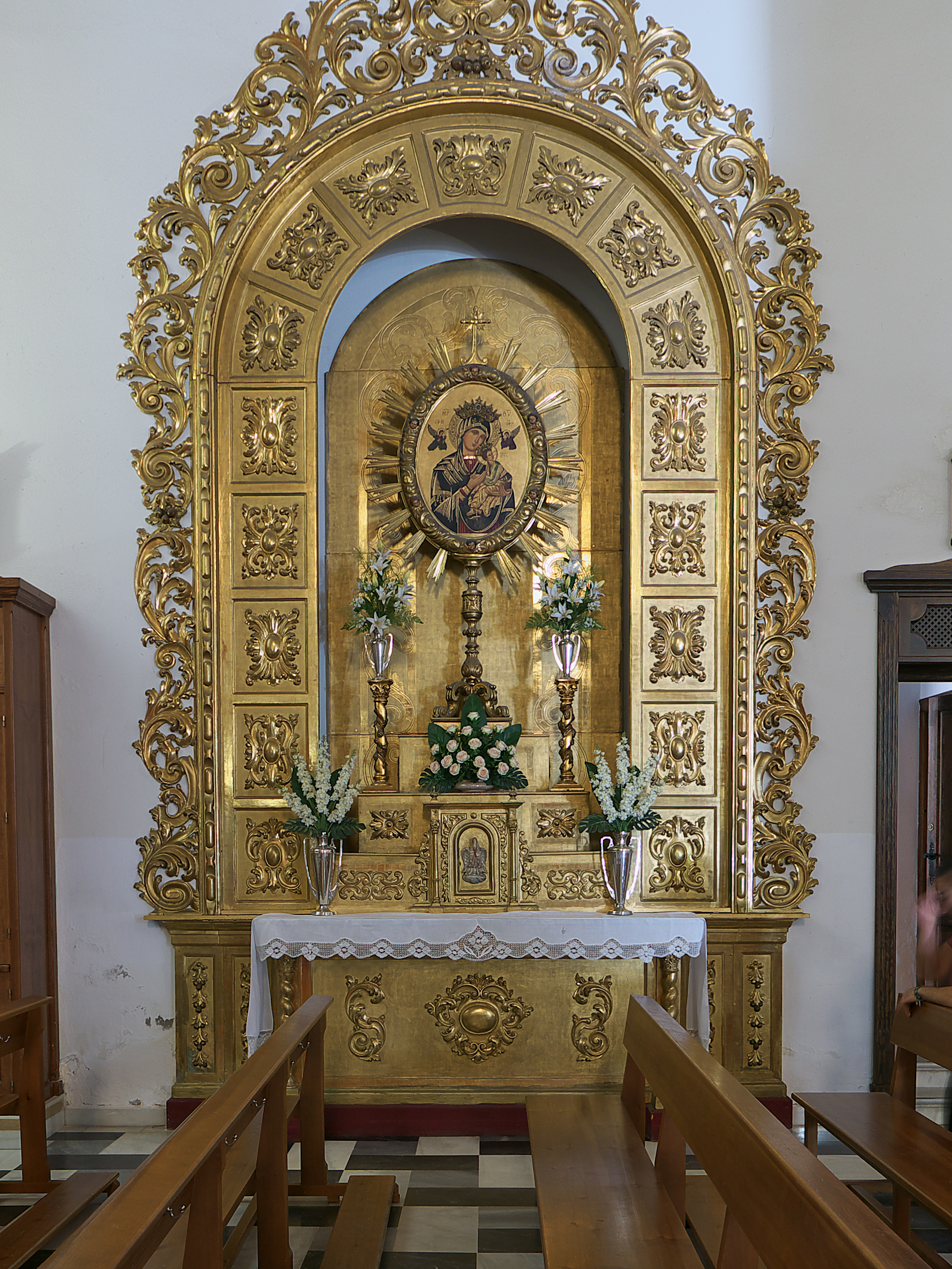 Primitivo altar de la Virgen del Perpetuo Socorro, situado en la nave de la Epístola.